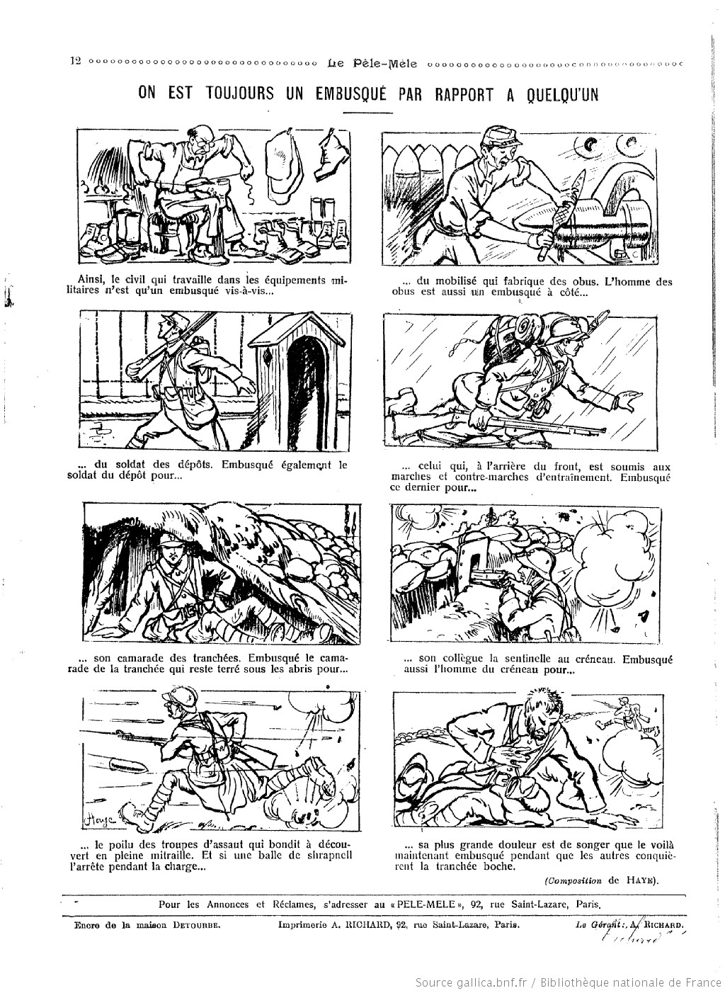 Le Pêle Mêle 4 6 16 On est toujours l'embusqué de quelqu'un